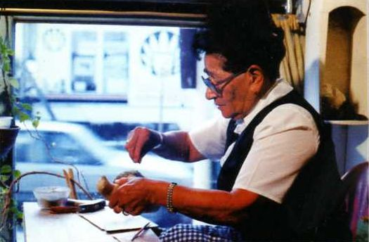 Enriqueta Gastelumendi, trabajando en un tallado en su casa de Ushuaia, Tierra del Fuego.